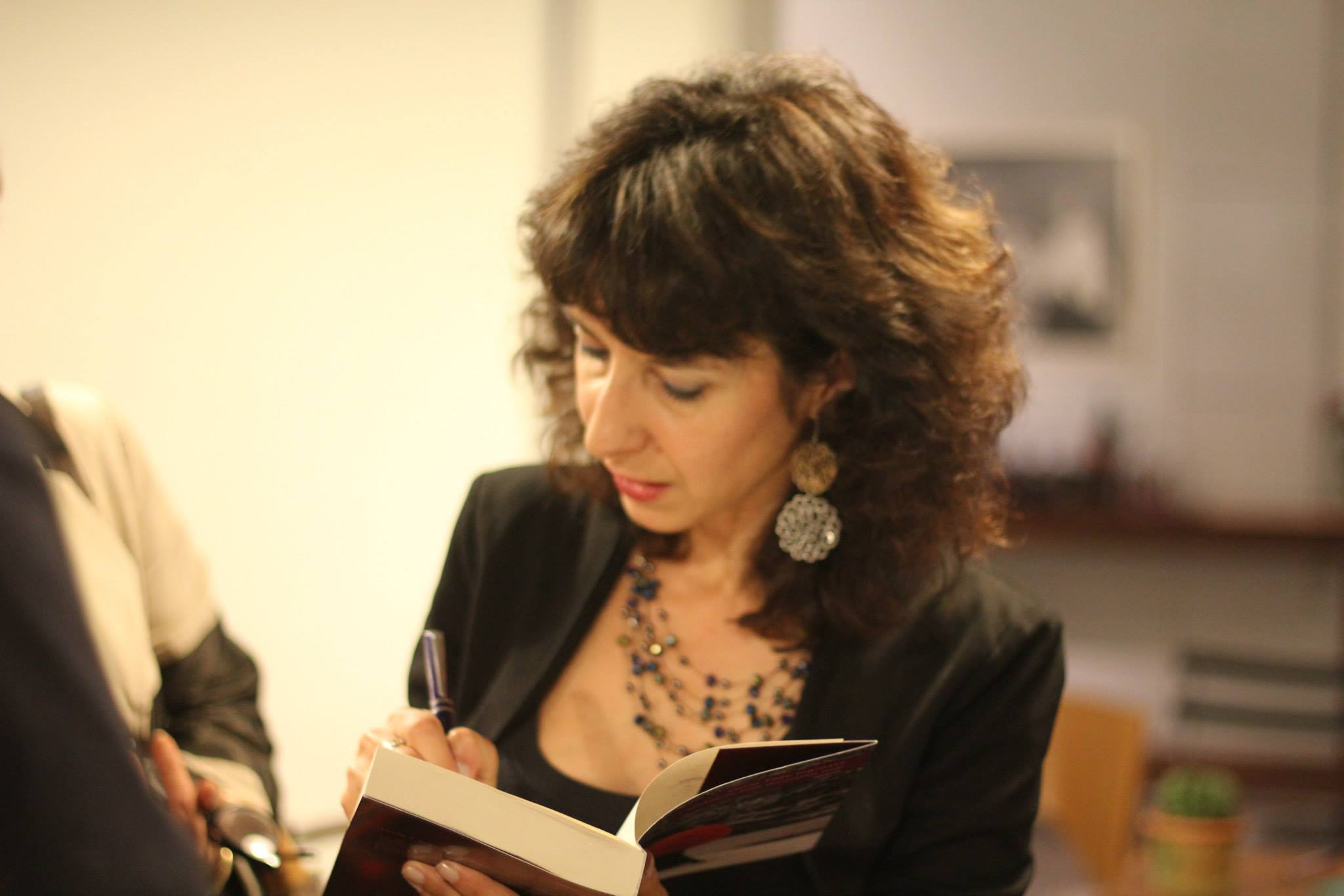 Lucia Tilde Ingrosso firma una copia di "I fantasmi non muoiono mai".